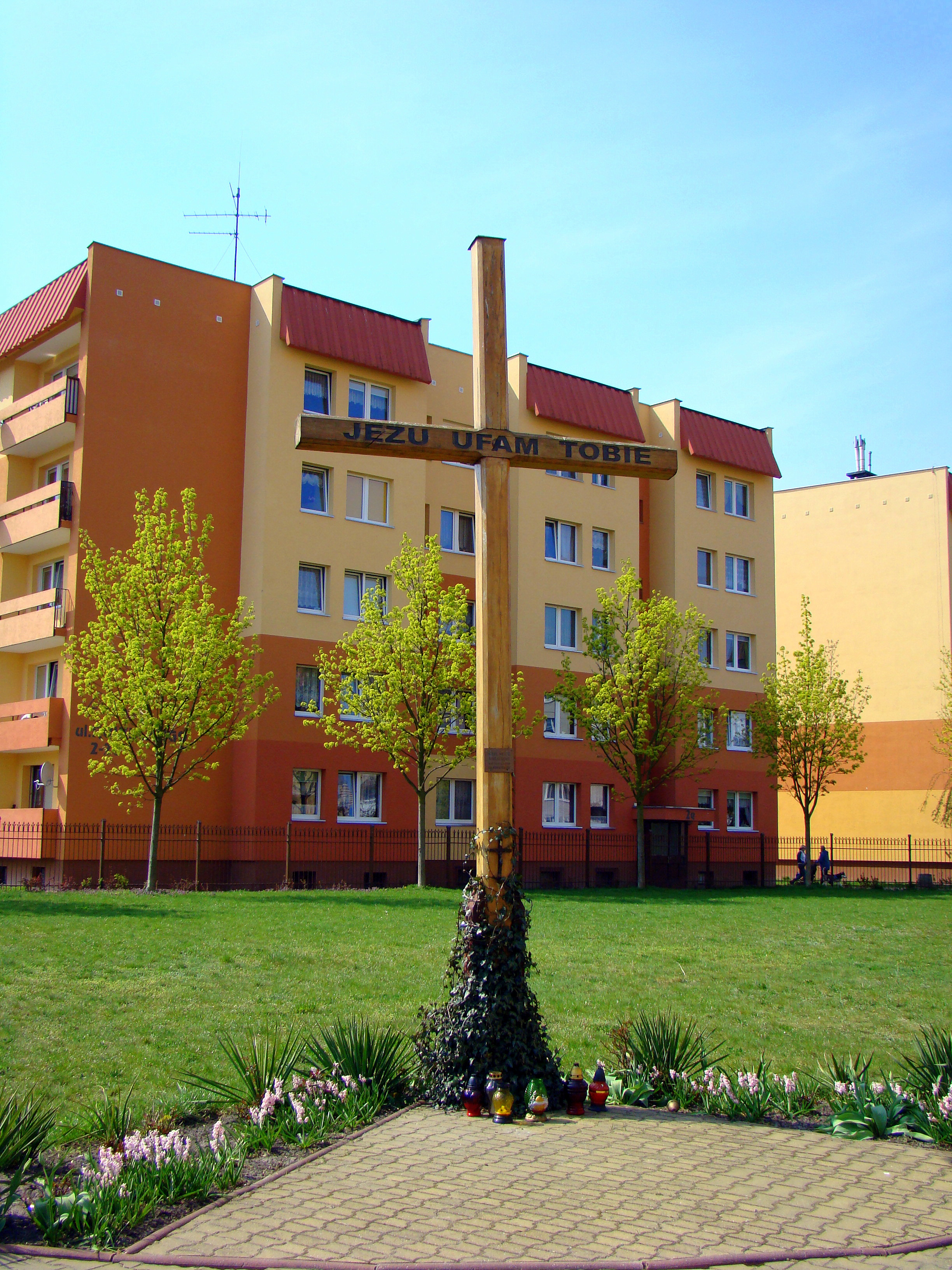 Kościół pw. św Kazimierza Królewicza w Policach (krzyż przykościelny), Polska